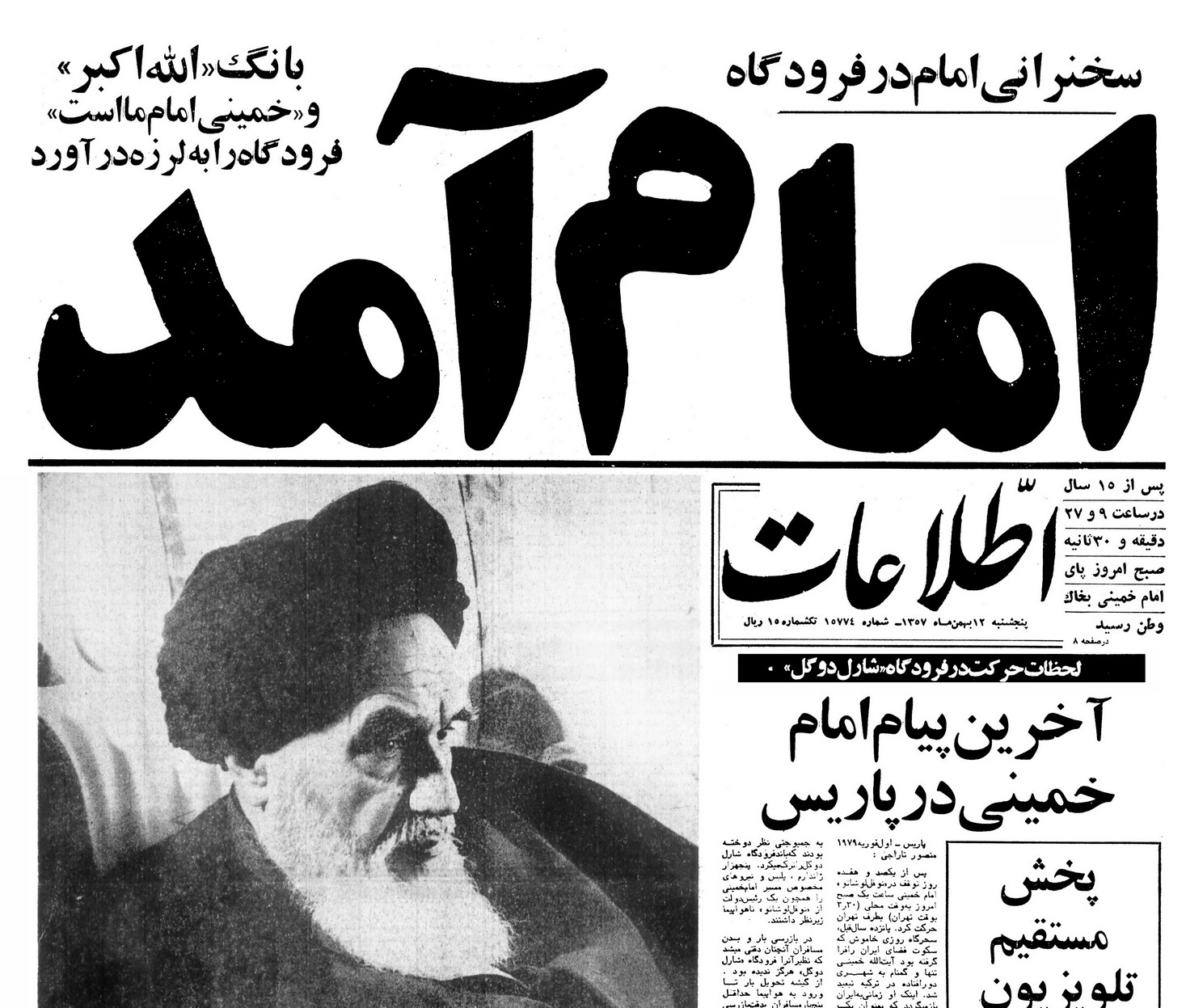 تیتر روزنامه اطلاعات به مناسبت بازگشت سید روح‌الله خمینی در ۱۲ بهمن ۱۳۵۷ به ایران تحت عنوان امام آمد.